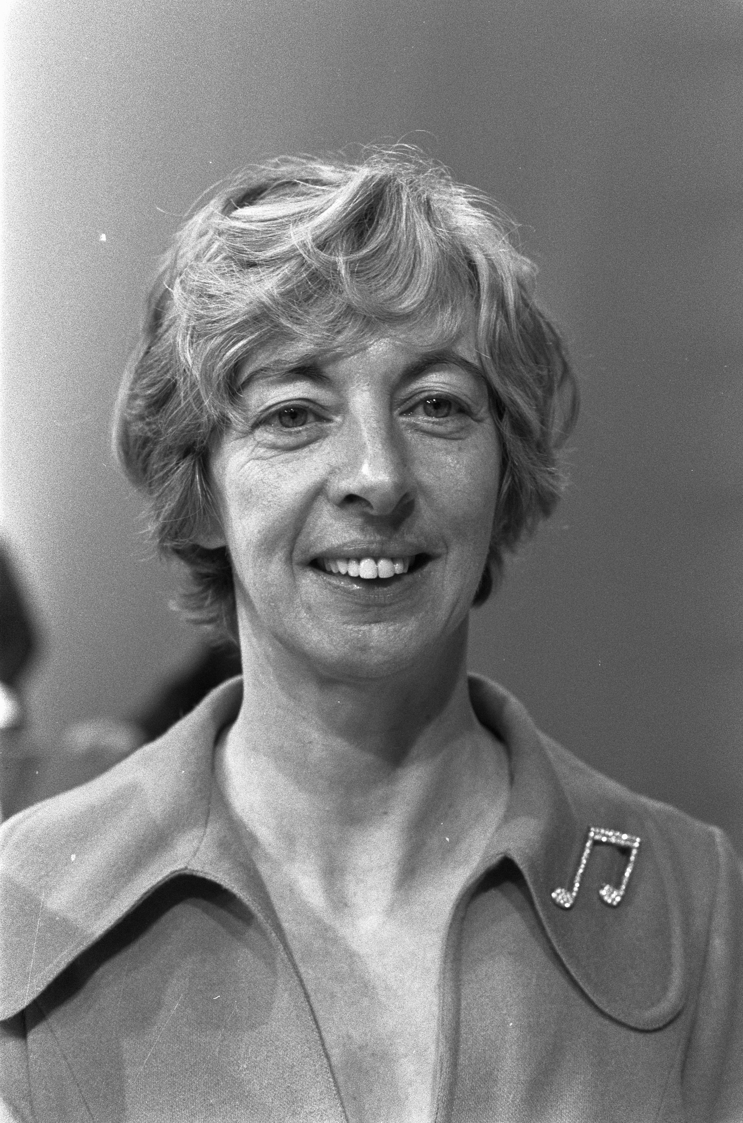 Collectie / Archief : Fotocollectie Anefo Reportage / Serie : [ onbekend ] Beschrijving : Hetty Blok Datum : 30 augustus 1972 Trefwoorden : actrices, portretten Persoonsnaam : Blok, Hetty Fotograaf : Punt, […] / Anefo Auteursrechthebbende : Nationaal Archief Materiaalsoort : Negatief (zwart/wit) Nummer archiefinventaris : bekijk toegang 2.24.01.05 Bestanddeelnummer : 925-8443